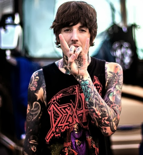 Oliver Sykes